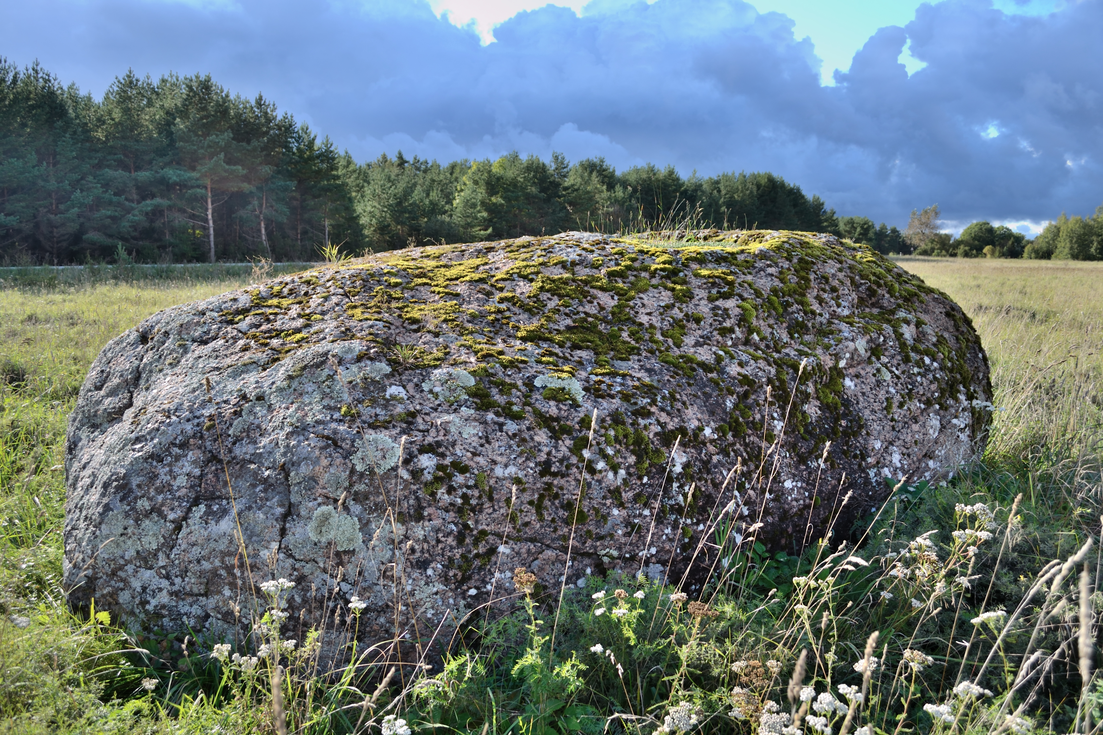 Kultusekivi, Saue vald, Püha küla Uuetoa